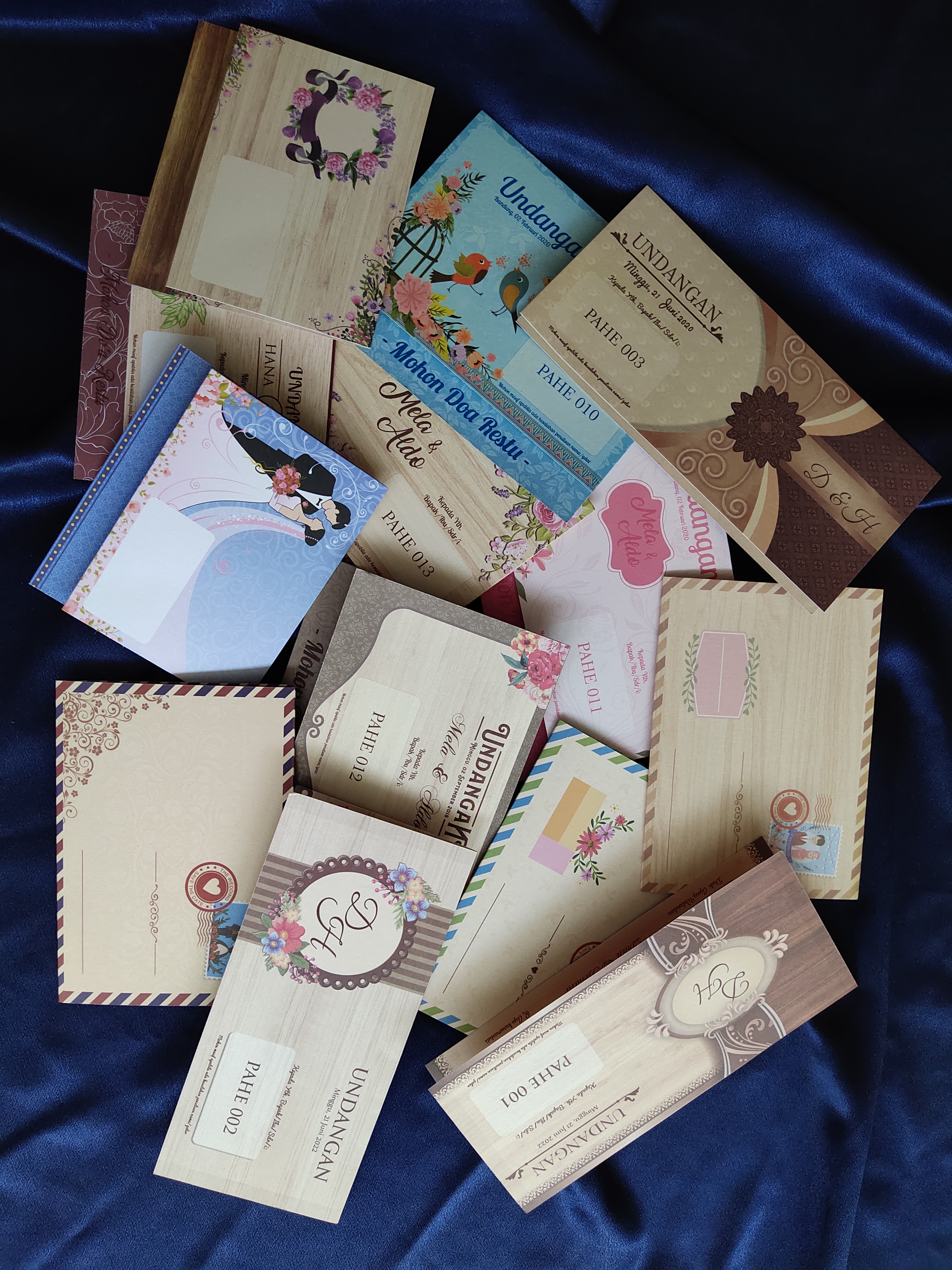 Kumpulan contoh undangan blangko